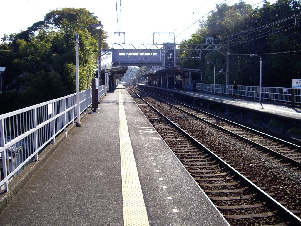 京浜急行 新大津駅 ホーム全景